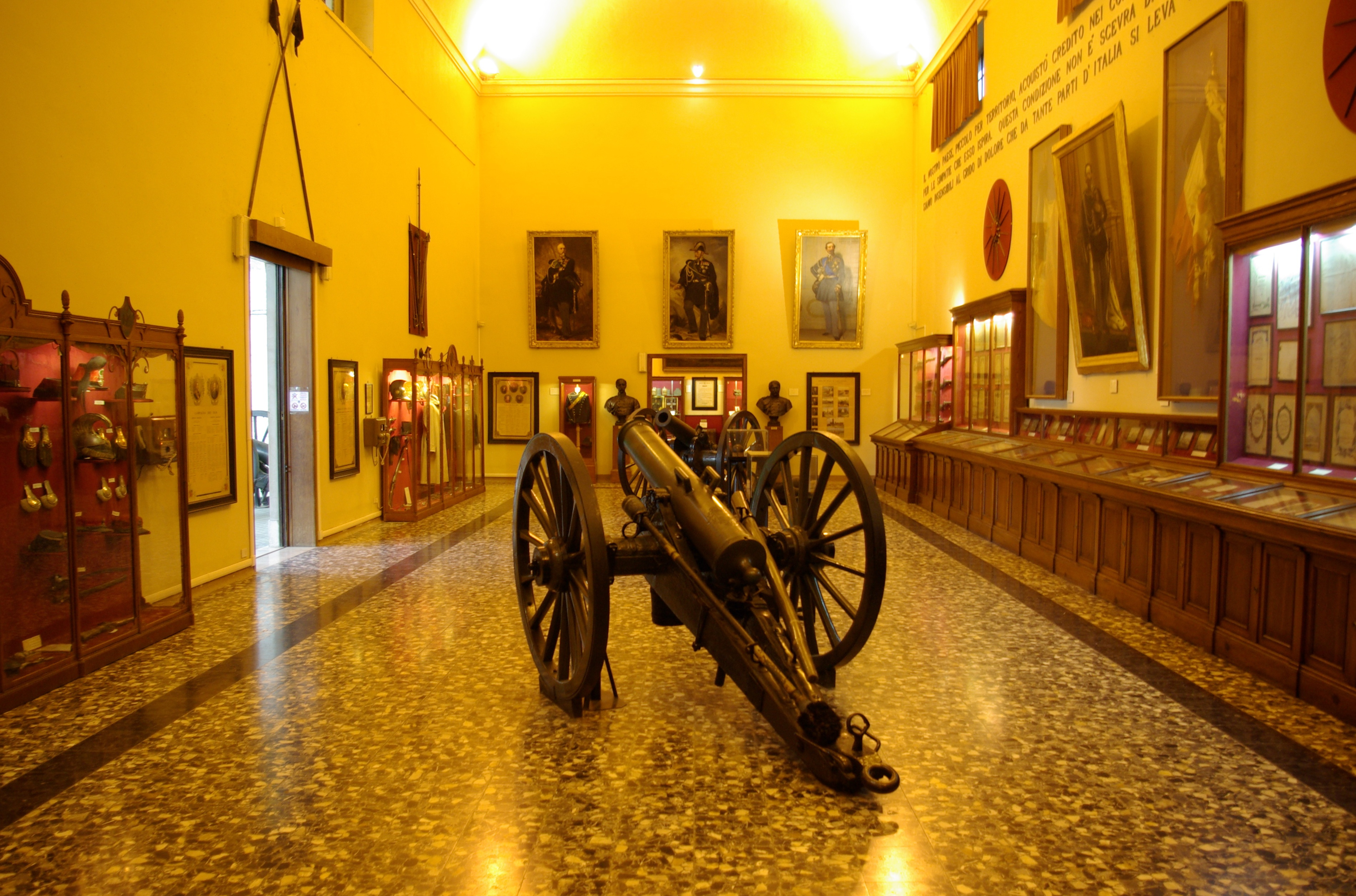 Innenraum der Gedenkstätte zur Schlacht von San Martino in San Martino della Battaglia bei Desenzano del Garda